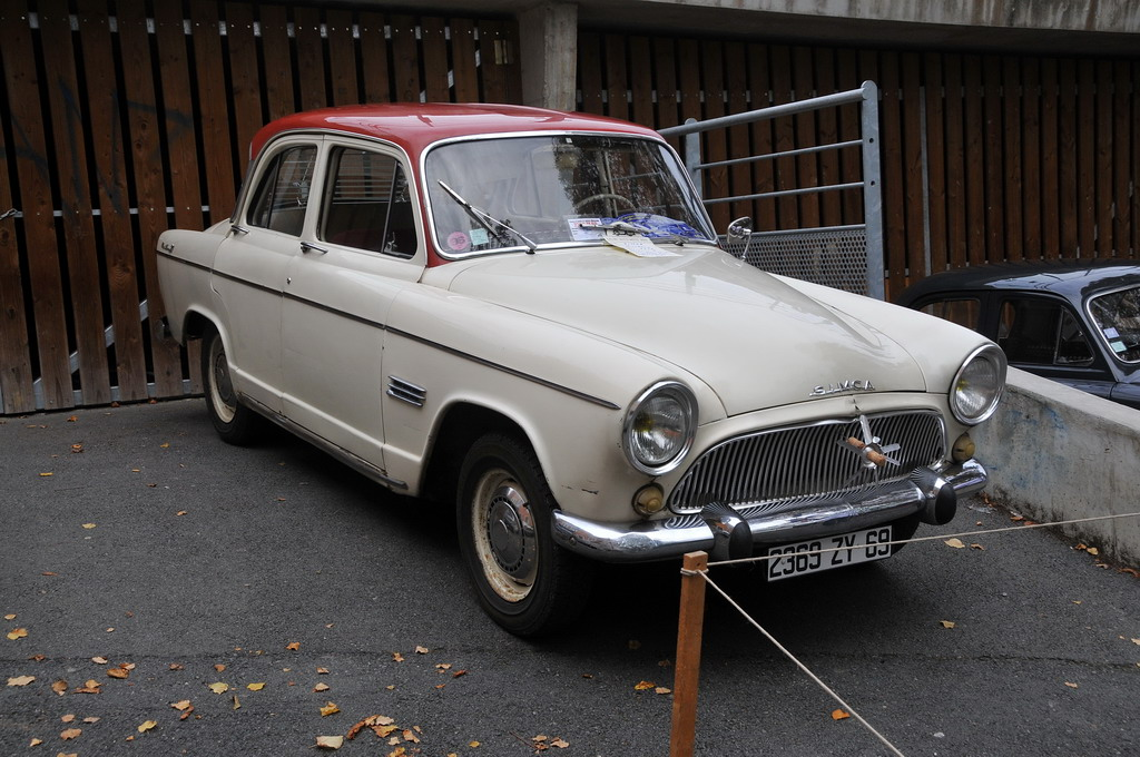 Salon Auto-Moto 2010 Le Bois d’Oingt Simca was een Frans automerk. De naam is een acroniem van Société Industrielle de Mécanique et de Carosserie Automobile; een autofabriek die in 1934 te Nanterre werd opgericht door Henri Pigozzi. In 1970 werd het concern door Chrysler ingelijfd. In 1978 nam PSA (moederbedrijf van Peugeot en Citroën) Chrysler France over voor 1 dollar. Het merk Simca werd op 1 januari 1980 omgedoopt naar Talbot. Een succes werd het niet. Peugeot besloot daarom het merk Talbot te laten uitdoven. De nieuwe middenklasser van Talbot, de Talbot Arizona, werd in 1985 als Peugeot 309 uitgebracht. In het Verenigd Koninkrijk werd de merknaam nog tot 1992 gehandhaafd voor de Talbot Express. Bron Wikipedia.